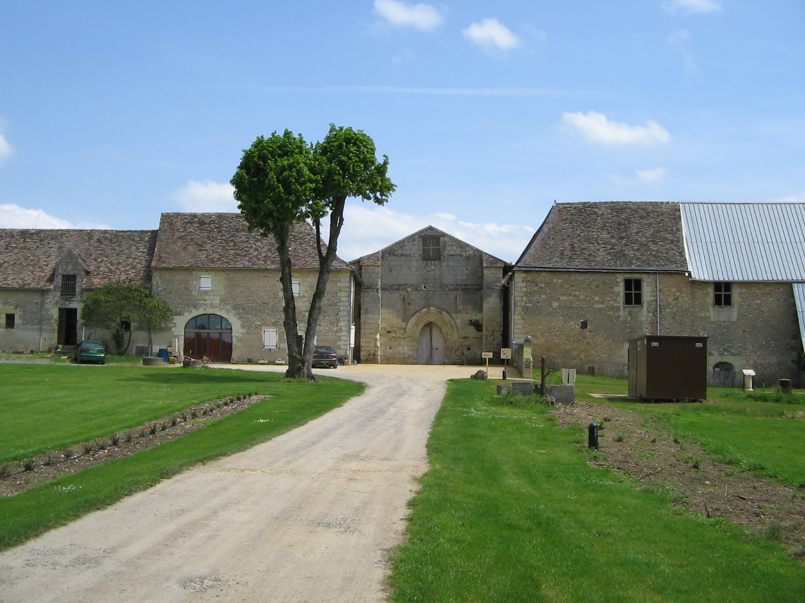 L'abbaye de l'Etoile (86) en mai 2012. (Archigny,département de la Vienne, région Poitou-Charentes).